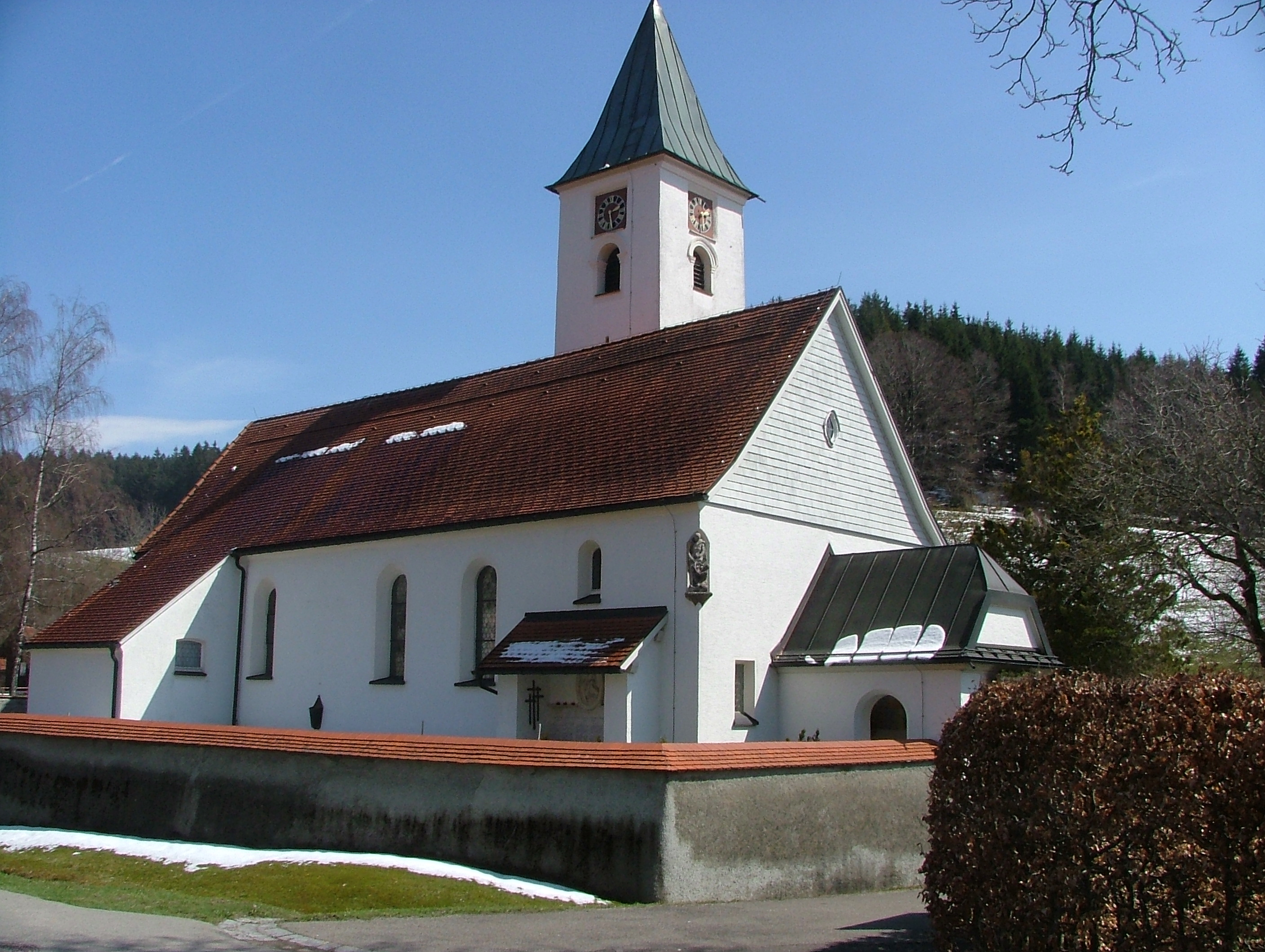 Bolsternang Kirche